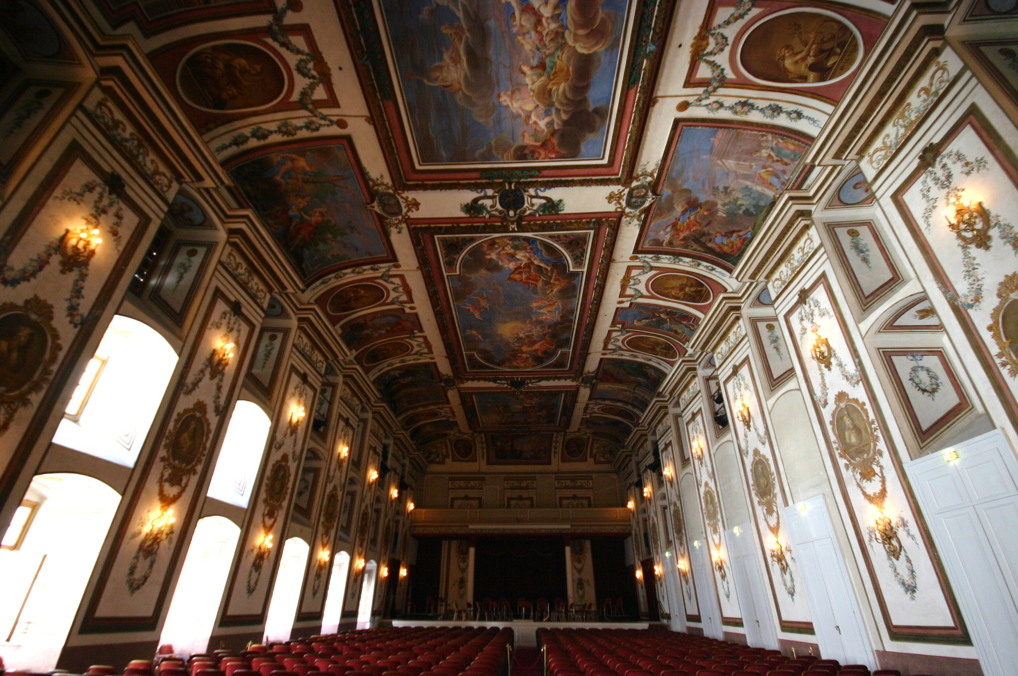 Haydnsaal im Schloss Esterházy